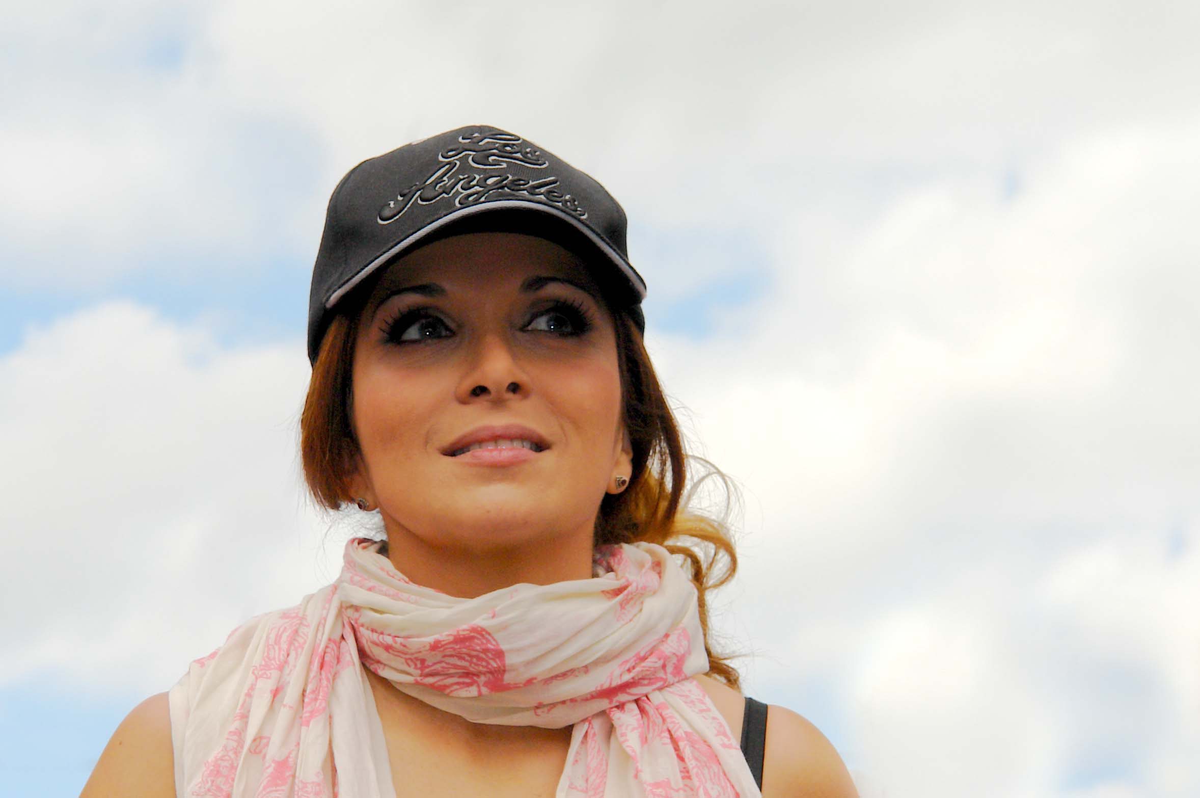 HELENE SEGARA au Ravel 2012 (action caritative)